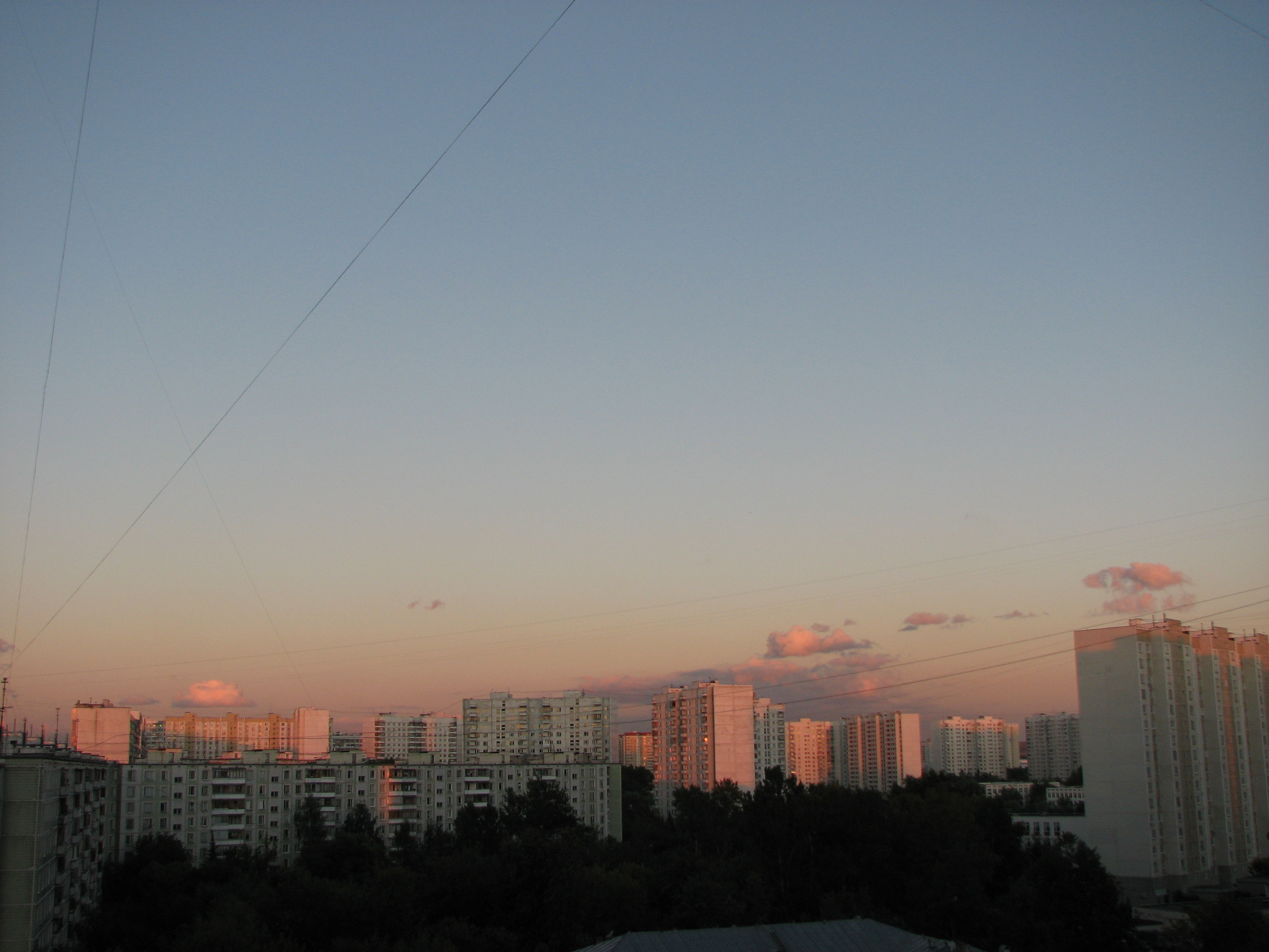 Солнцево.